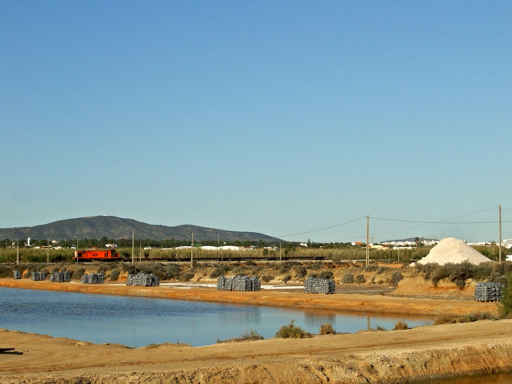 Tipo: Comboio de Transporte de Areia (material vazio) 62994 [Vila Real de Santo António - Poceirão] Local: Belamandil (Olhão) [Linha do Algarve, PK 347] Data e hora: 9 de Outubro de 2008 [17h08] Material: Locomotiva 1559 + 4 vagões (1 CP Rlps e 3 CP Rblps) ao fundo, o Cerro de São Miguel (altitude: 410 m • Serra de Monte Figo).